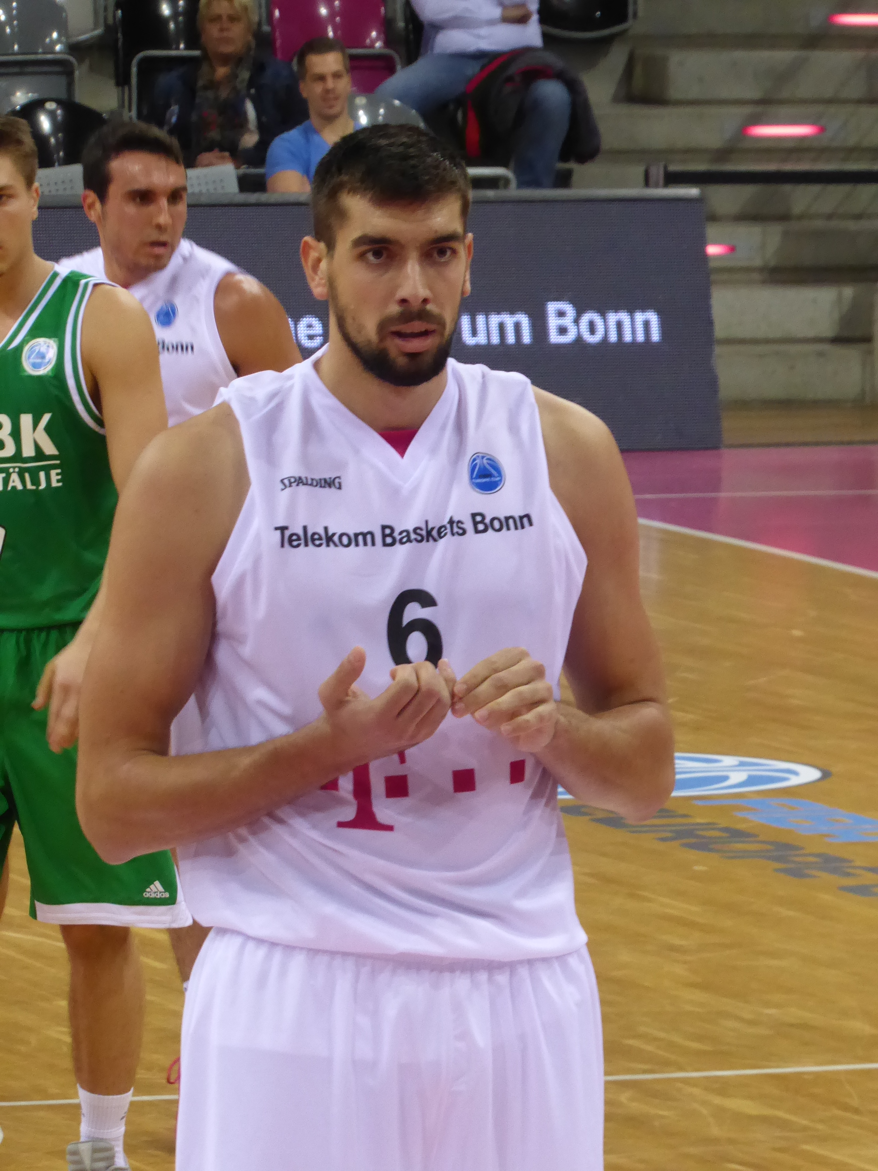 Filip Barovic beim Spiel der Telekom Baskets Bonn gegen die Södertälje Kings am 25. Oktober 2016.